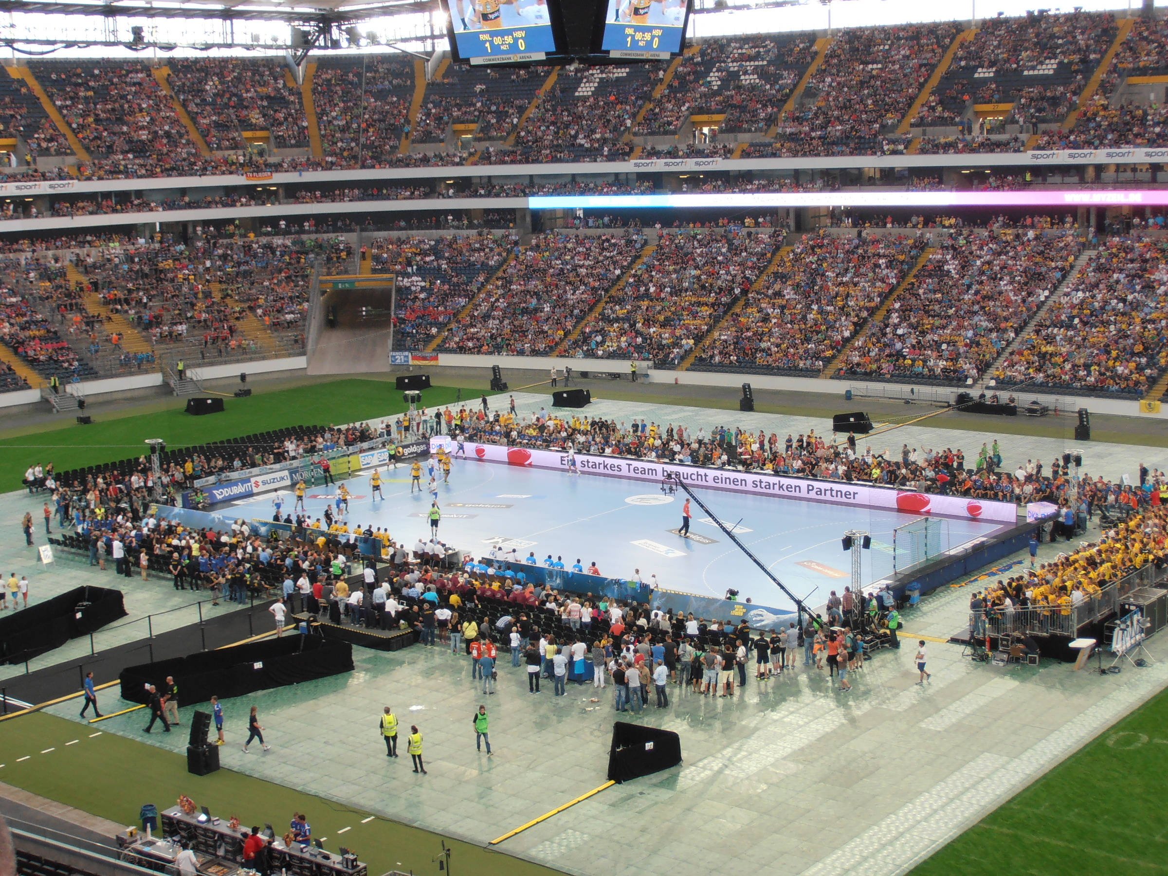 Das Handballspiel Rhein-Neckar Löwen gegen HSV Hamburg am 6. September 2014 in der Frankfurter Commerzbank-Arena, am Tag des Handballs.